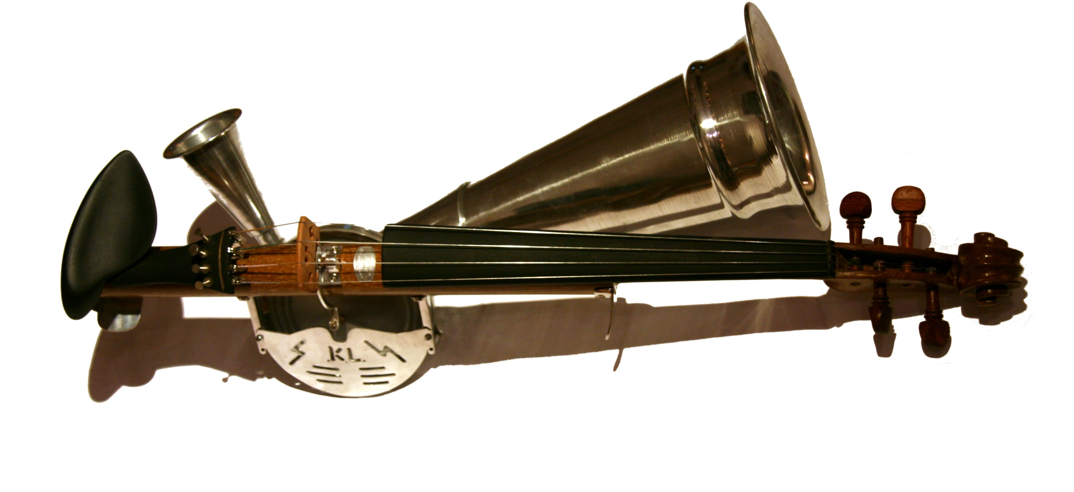 Stroh Violin